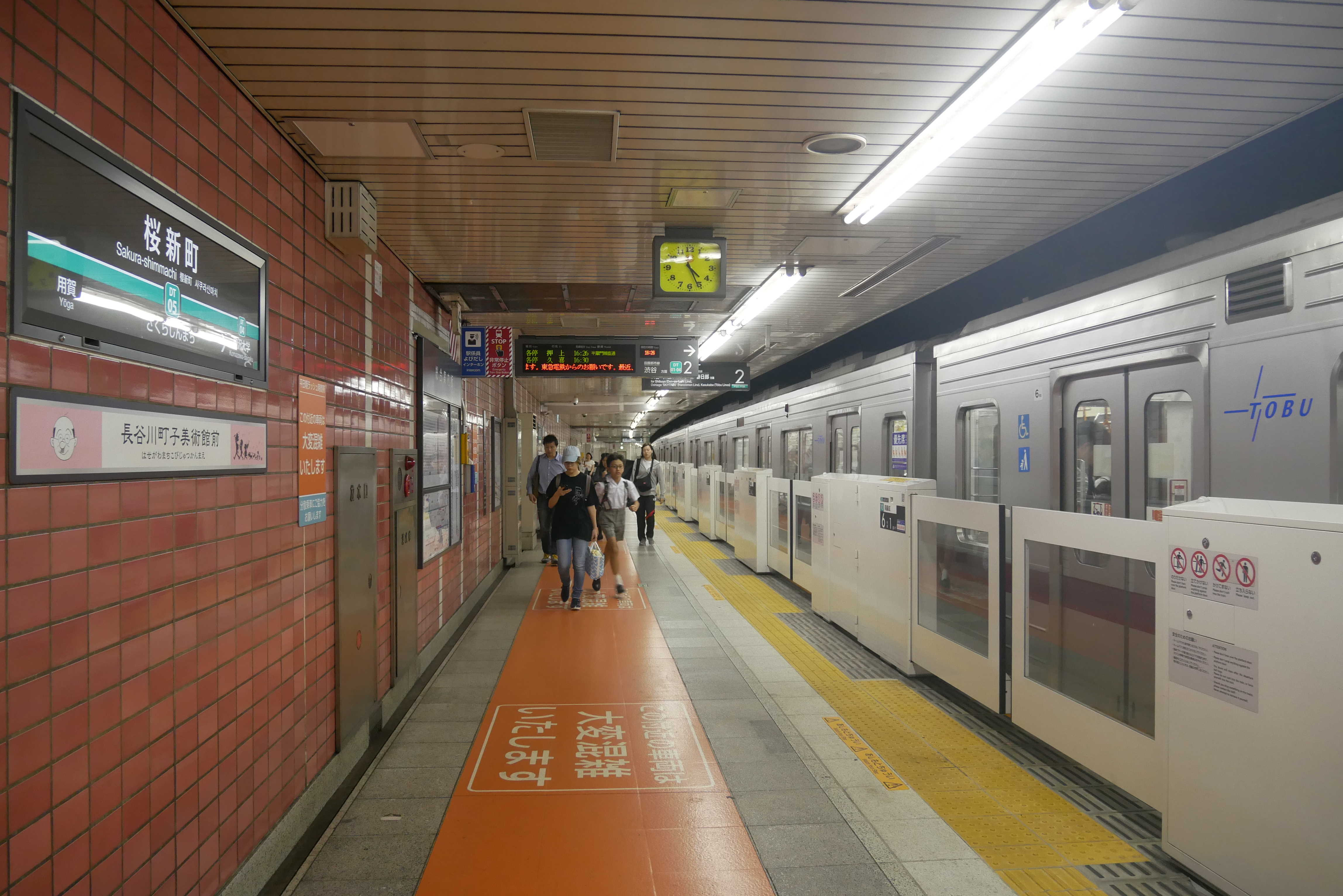 桜新町駅のホーム（Sakura-shimmachi Station platform）